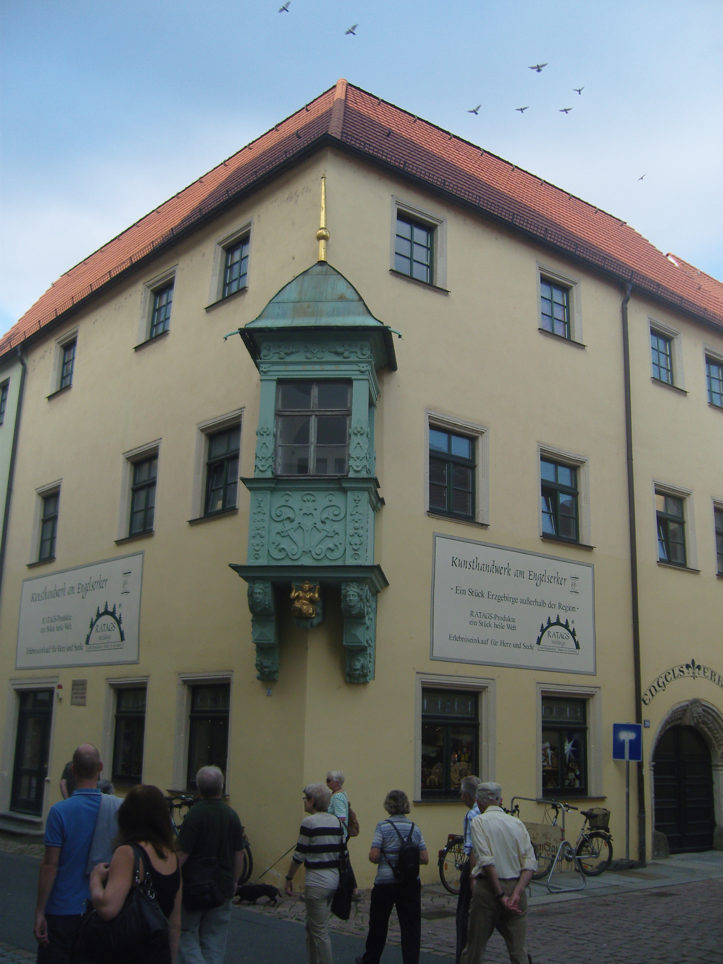 Denkmalgeschütztes Haus Engelserker in der Barbierstr. 10 in Pirna aufgenommen von der Dohnaischen Straße aus